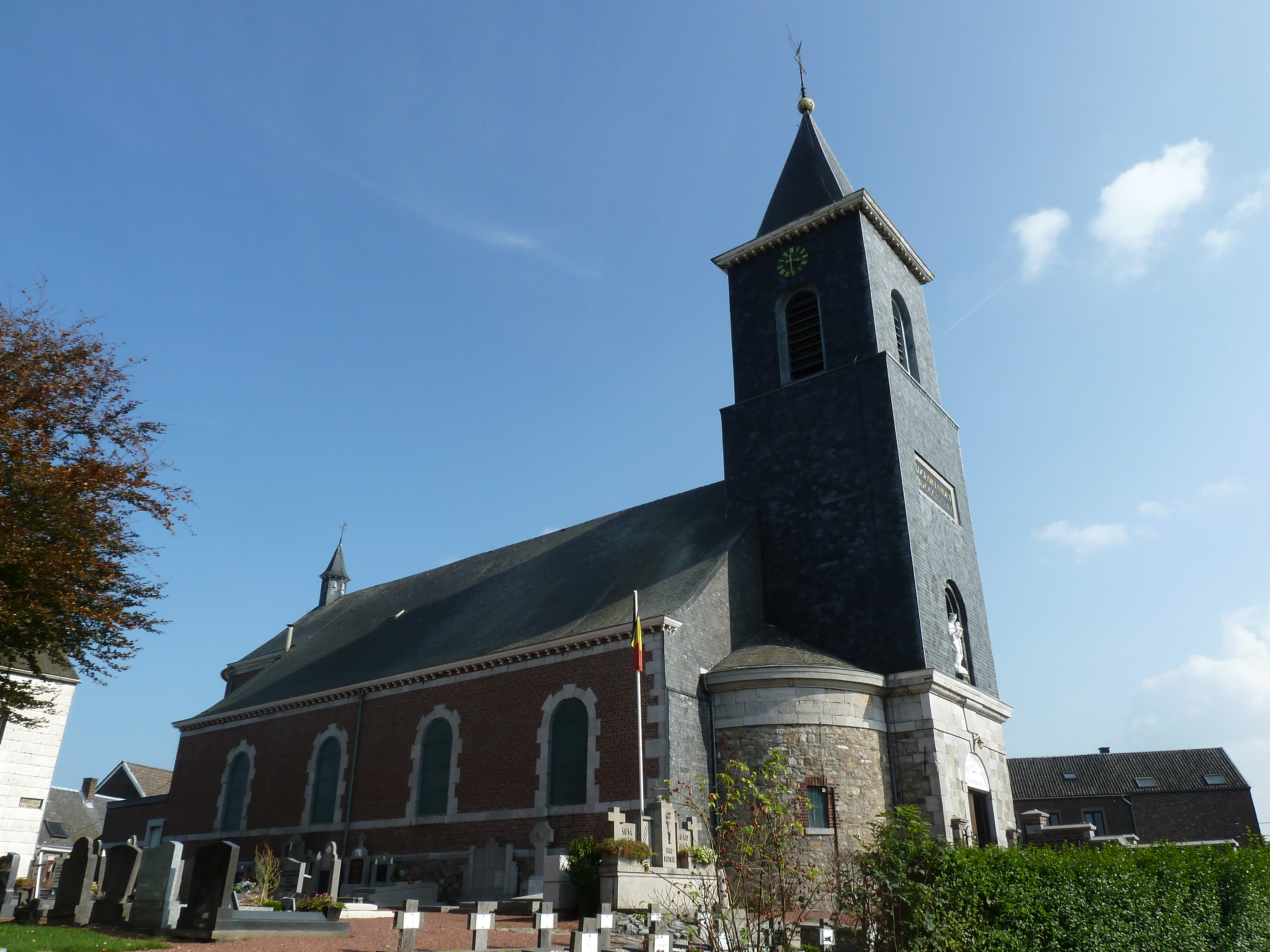 Eglise Saint Brice, Hombourg, Plombières, Belgique